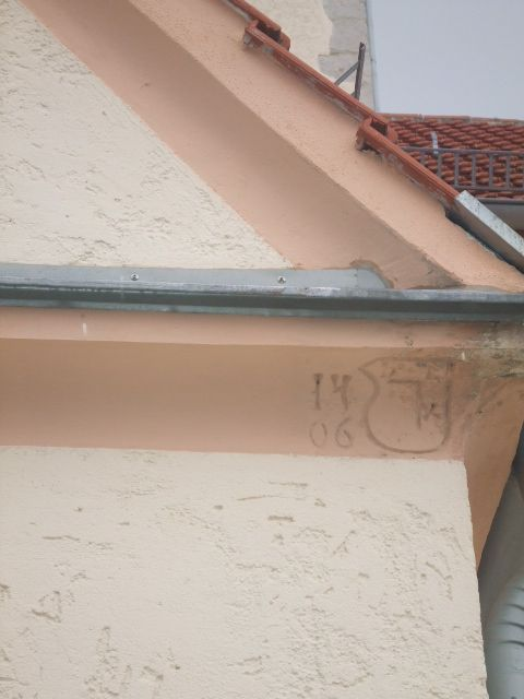 Pfarrkirche Mariä Himmelfahrt, Allmendingen An der Außenseite der Sakristei (früher Beichtkapelle) die älteste Jahreszahl an der Kirche, die Jahreszahl 1406, und ein Parlier-Zeichen.